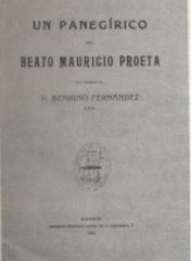 Un panegírico del beato Mauricio Proeta. Editat per P. Benigno Fernández l'any 1913.